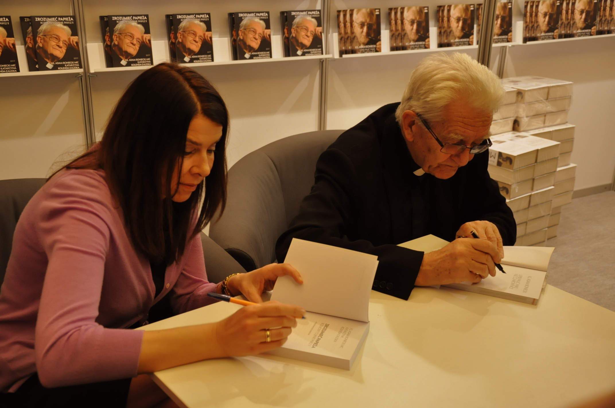 Katarzyna Kolenda-Zaleska i ks. Adam Boniecki na III Warszawskich Targach Książki